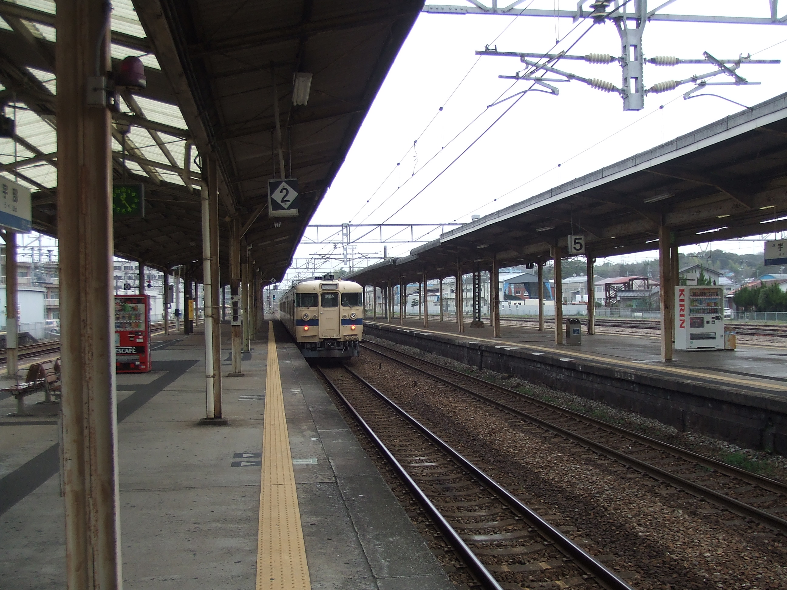 宇部駅 駅構内